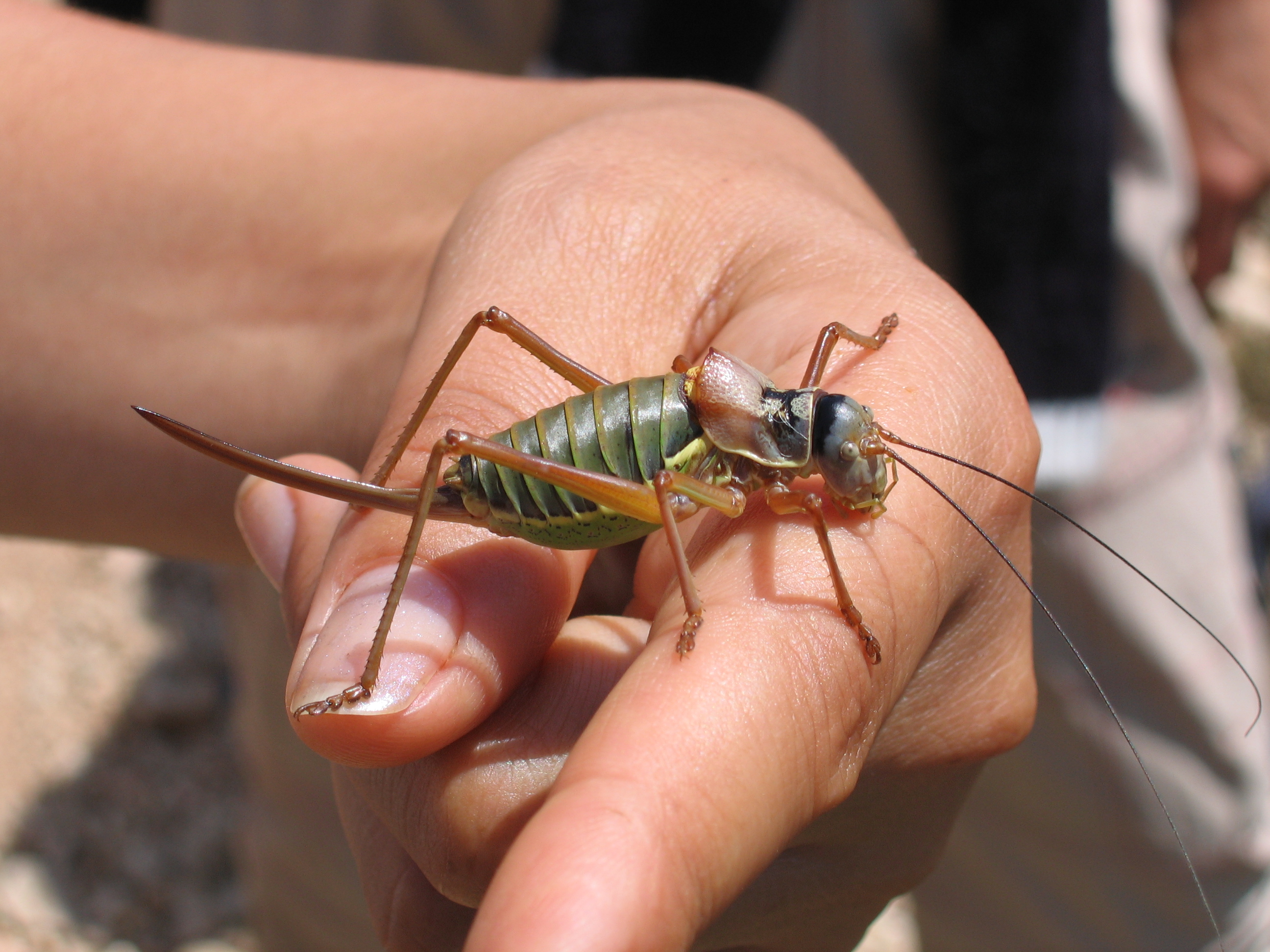 Description: Ephippigère, Sauterelle sans ailes, dite parfois "des vignes" Hérault, France Source: Hugo Soria Licence: GFDL Hugo Soria